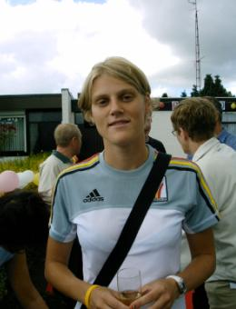 Lien Huyghebaert die bij haar thuiskomst vanuit Athene ontvangen werd als een heldin. Deze foto werd genomen door broer van Lien bij haar thuiskomst. (Daar ik haar broer ben, heb ik het volledige recht deze foto te publiceren.)